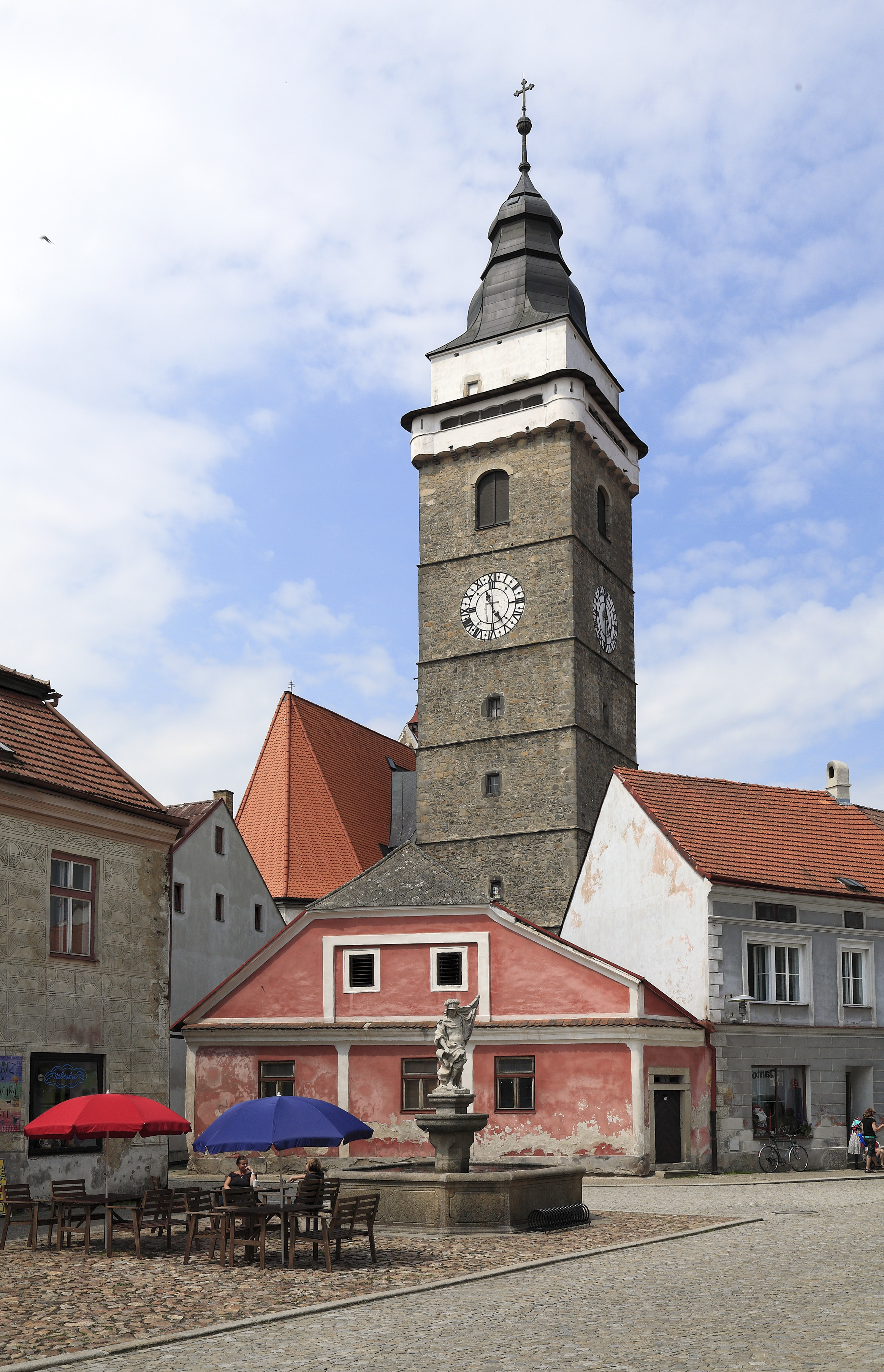 Vom Obermarkt, davor der Floriansbrunnen. Das rote Haus mit dem Giebel ist Nummer 531.